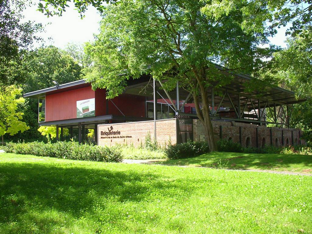 Musée de la Briqueterie à Langueux (Côtes-d'Armor)